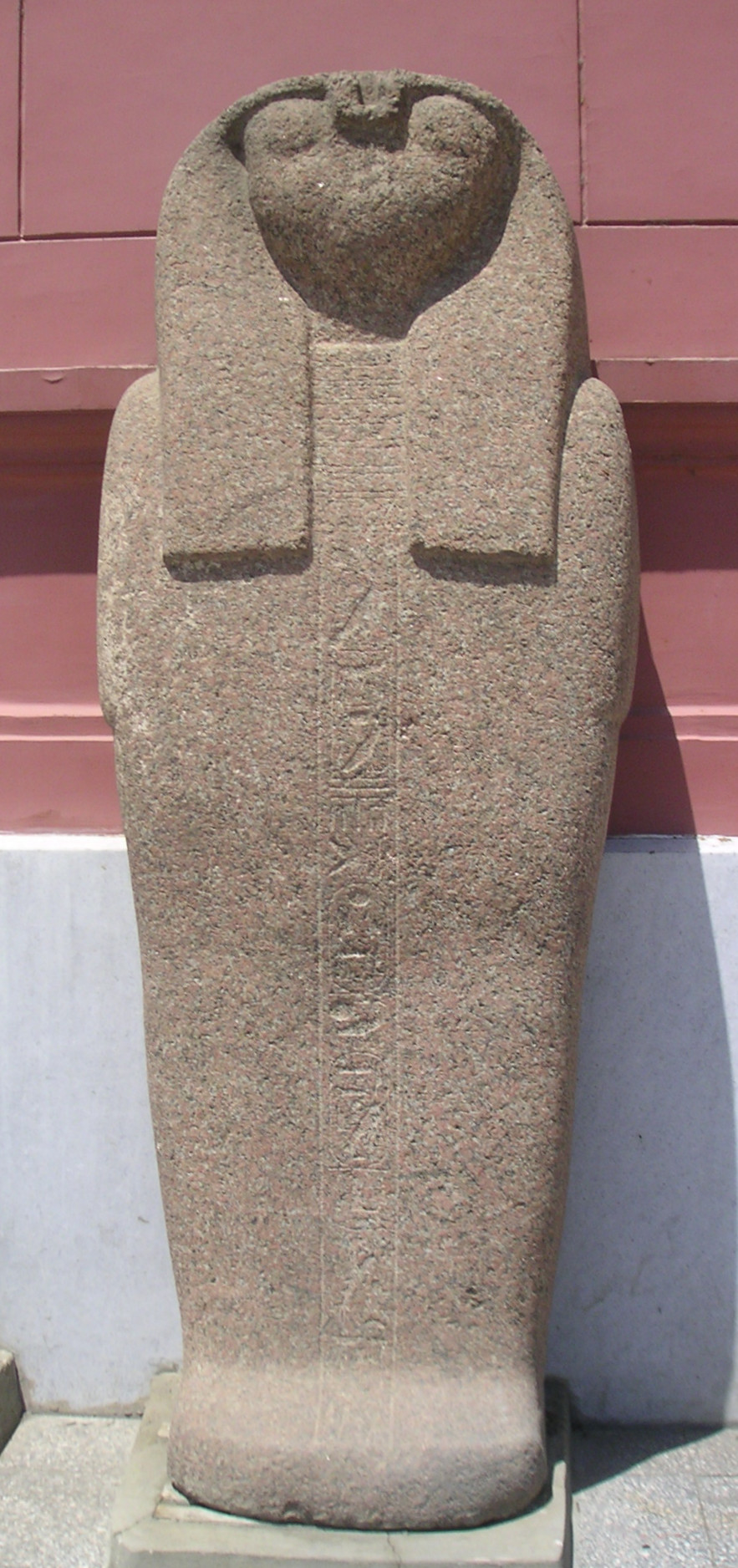 Sarcophage hiéracocéphale d'Harsiésis